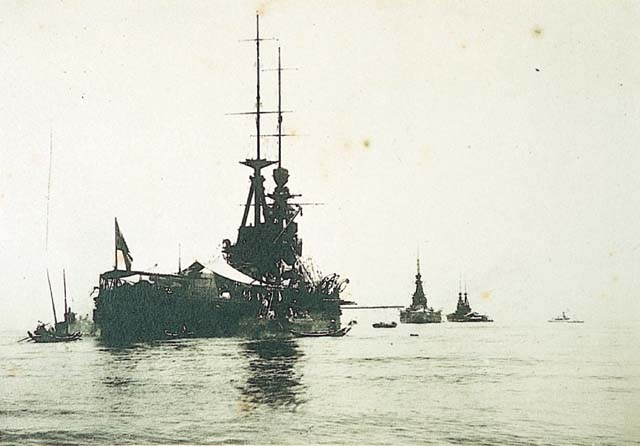 中文（台灣）: 裕仁太子停泊在高雄港外的御召艦(即太子來台所搭乘之船艦)。